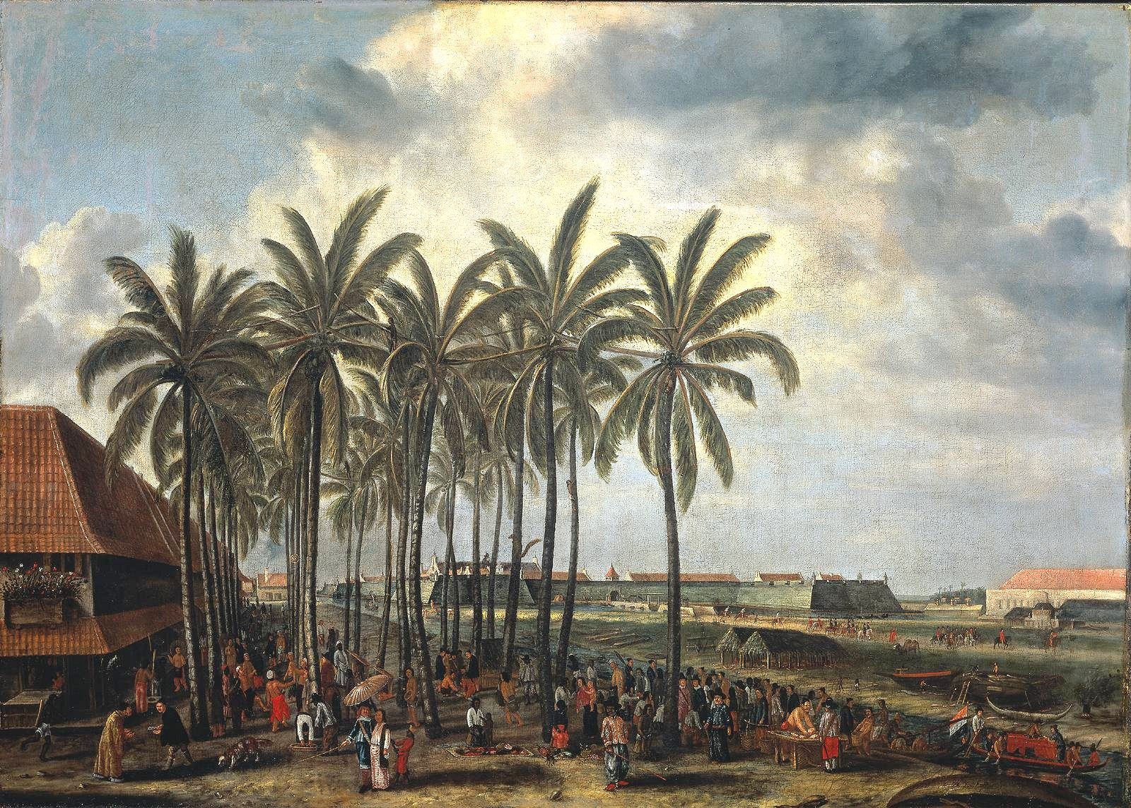 Ölgemälde von Andries Beeckman: Die Festung von Batavia, gesehen vom Westen Kali Besar, c. 1656. 108 x 151.5 cm.